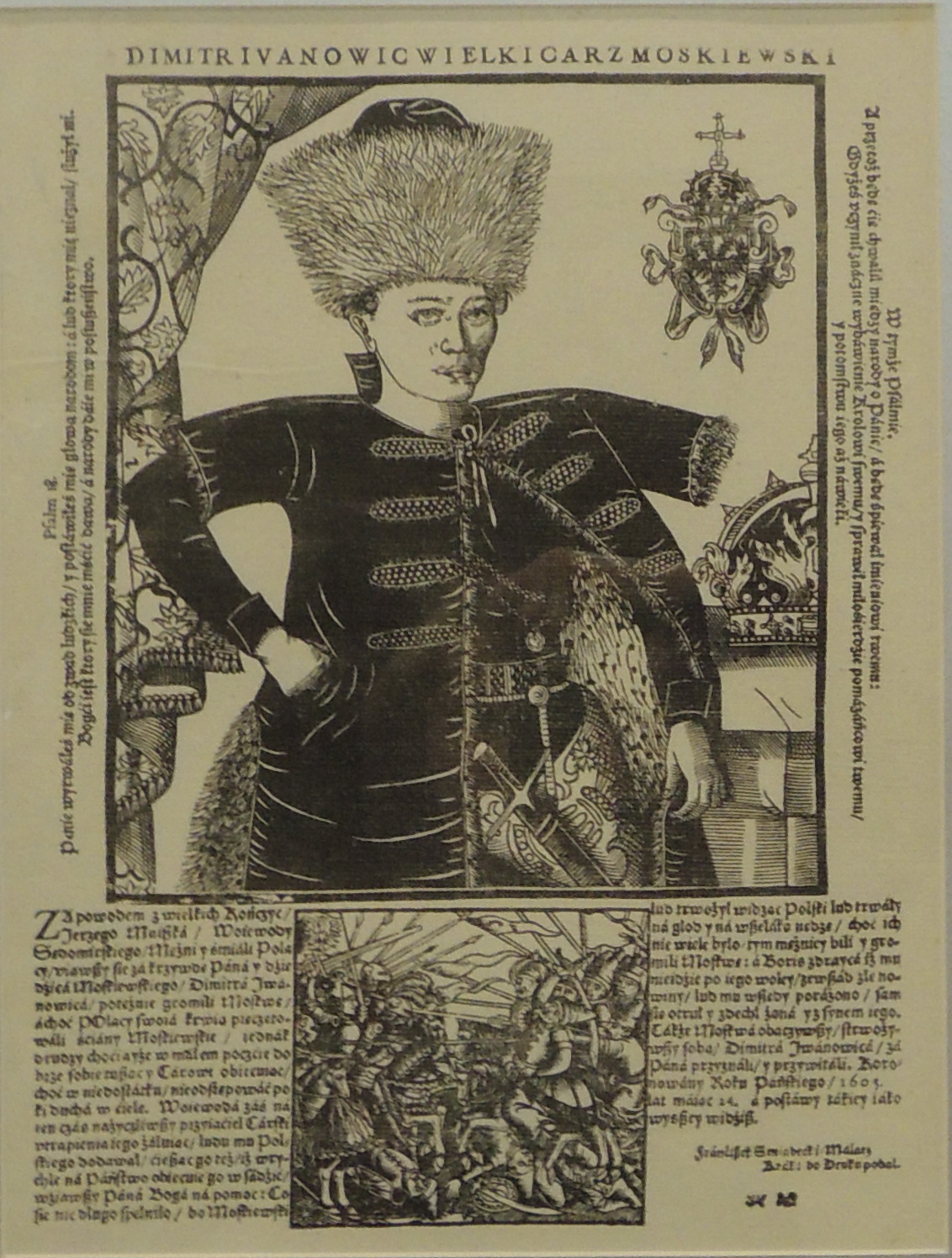 False Dmitry I / Лжедмитрий I. Engraving.